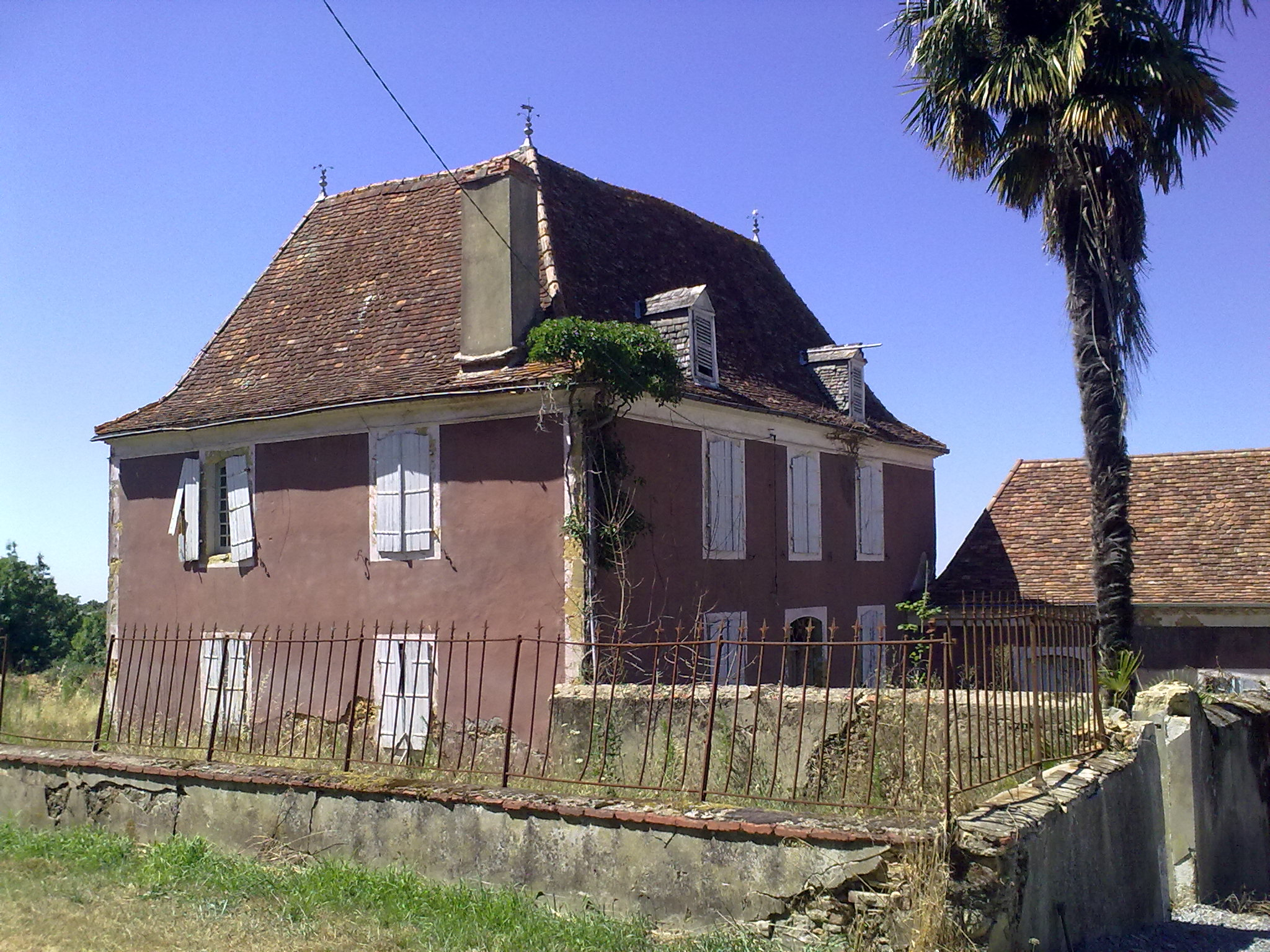 Saint-Médard (Pyrénées-Atlantiques) le 18 juillet 2010, France.